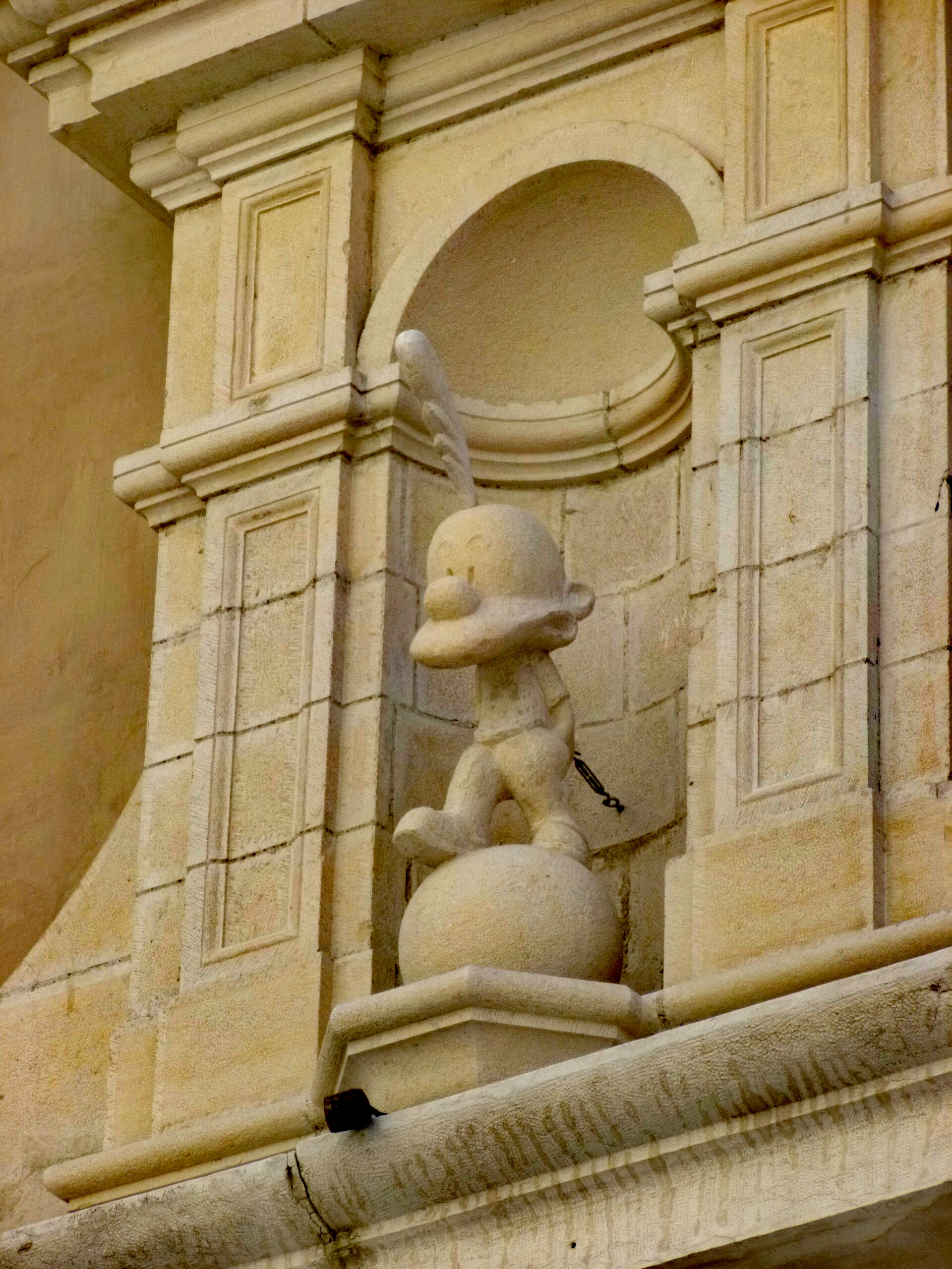 Statue de Titeuf sur le fronton du monastère Sainte-Cécile de Grenoble, siège des éditions Glénat.